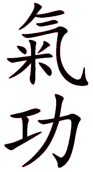 Caractères chinois désignant le "Qi Gong"